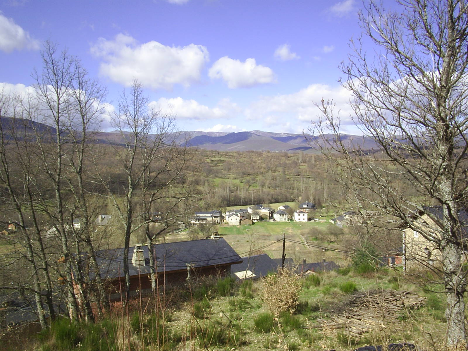 Galende desde el barrio "Cima"